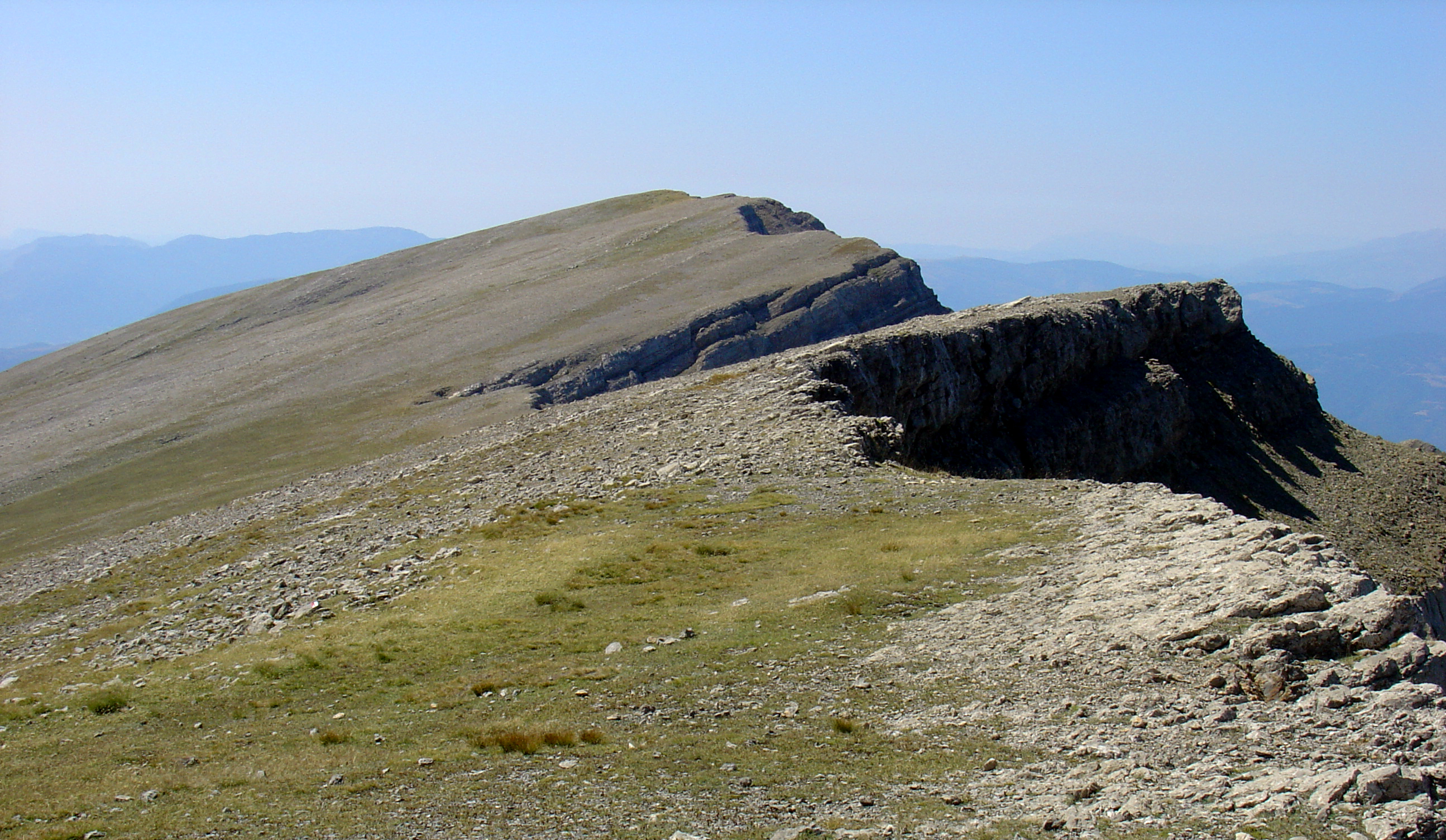 Torreta de Cadí. This is a a photo of an emblematic summit in Catalonia, Spain, with id: CE-275083006